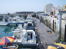 臺灣澎湖縣鳥嶼碼頭。